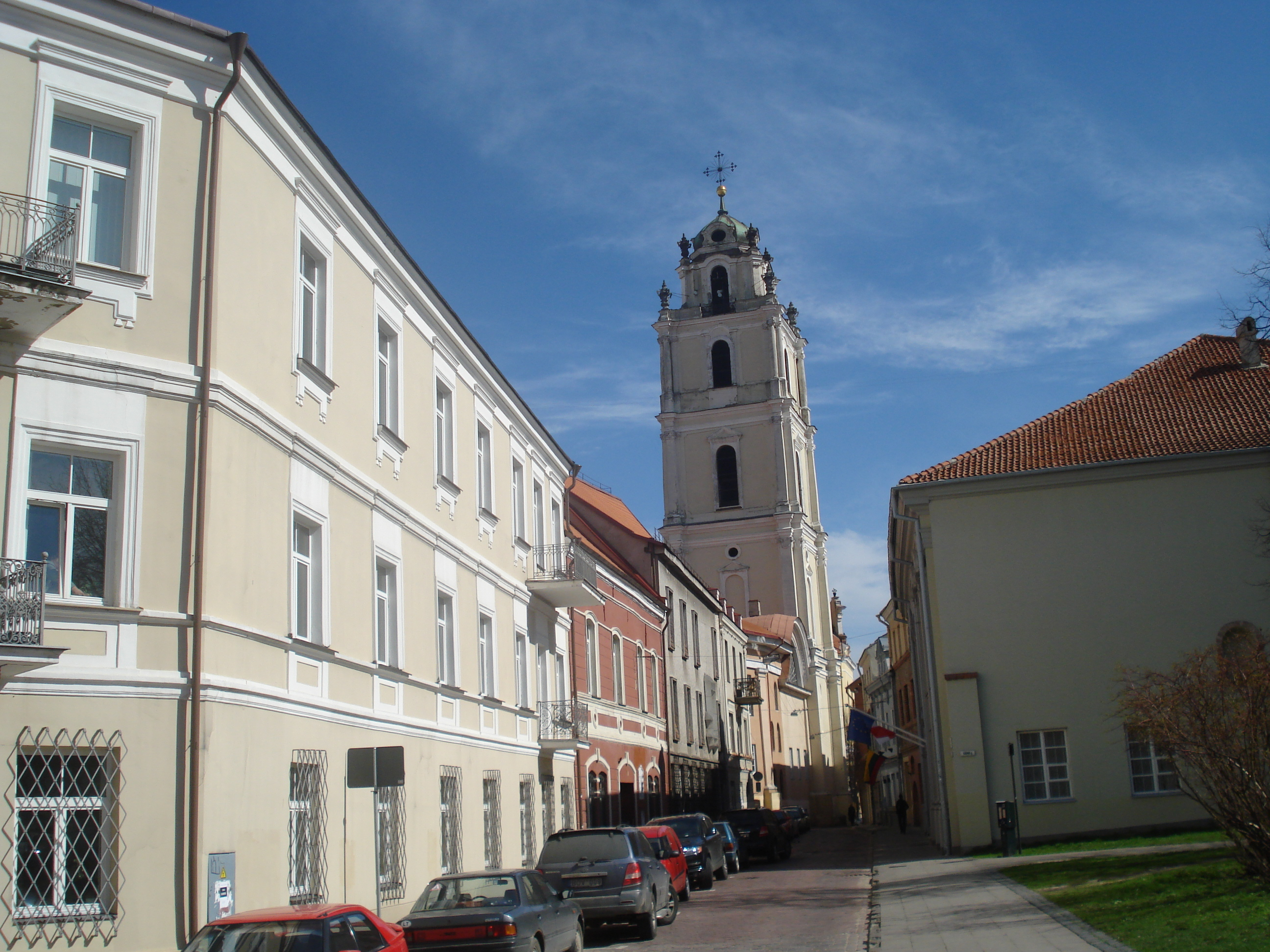 Švento Jono street in Vilnius